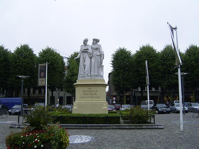 Maaseik, zomer 2004